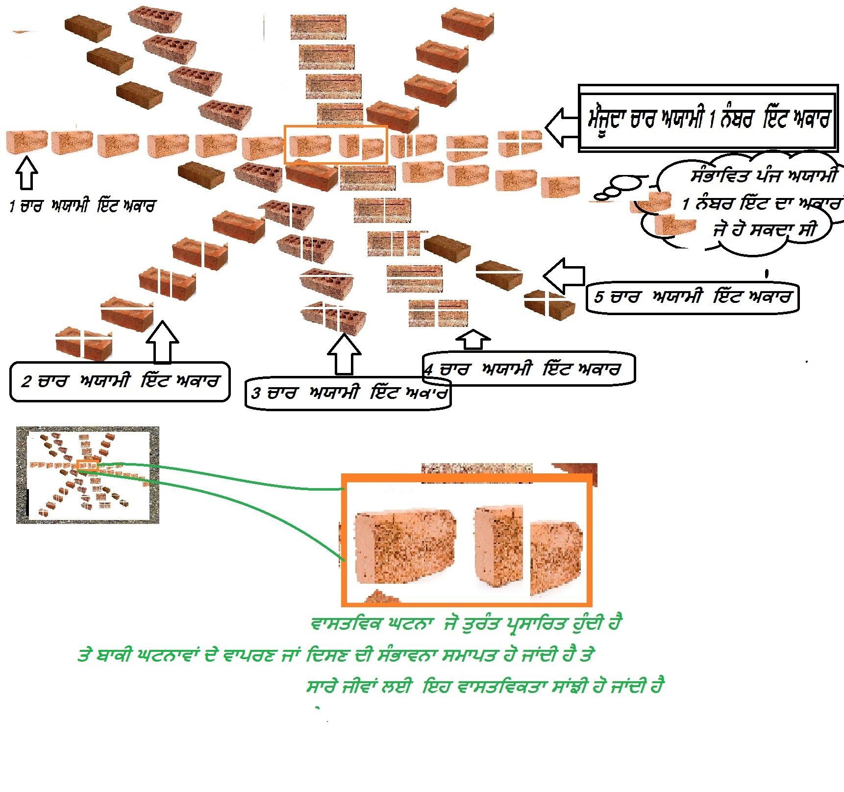 ਪੰਜਾਬੀ: ਕਈ ਸੰਸਾਰ ਵਿਆਖਿਆ ਦੀ ਇੱਕ ਉਦਾਹਰਨ ਜਿਸ ਵਿੱਚ ਇੱਕ ਇੱਟ ਦੇ ਵੇਵ ਫੰਕਸ਼ਨ ਟੁੱਟਣ ਨਾਲ ਬਾਕੀ ਅਕਾਰਾਂ ਦਾ ਅਲੋਪ ਹੋ ਜਾਣਾ ਦਿਖਾਇਆ ਗਿਆ ਹੈ